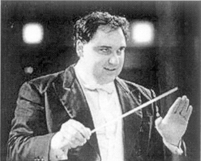 Luis Carlos Ortiz, Compositor y Director de Orquesta.